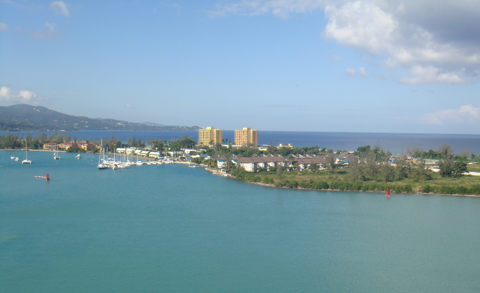 Jamaica